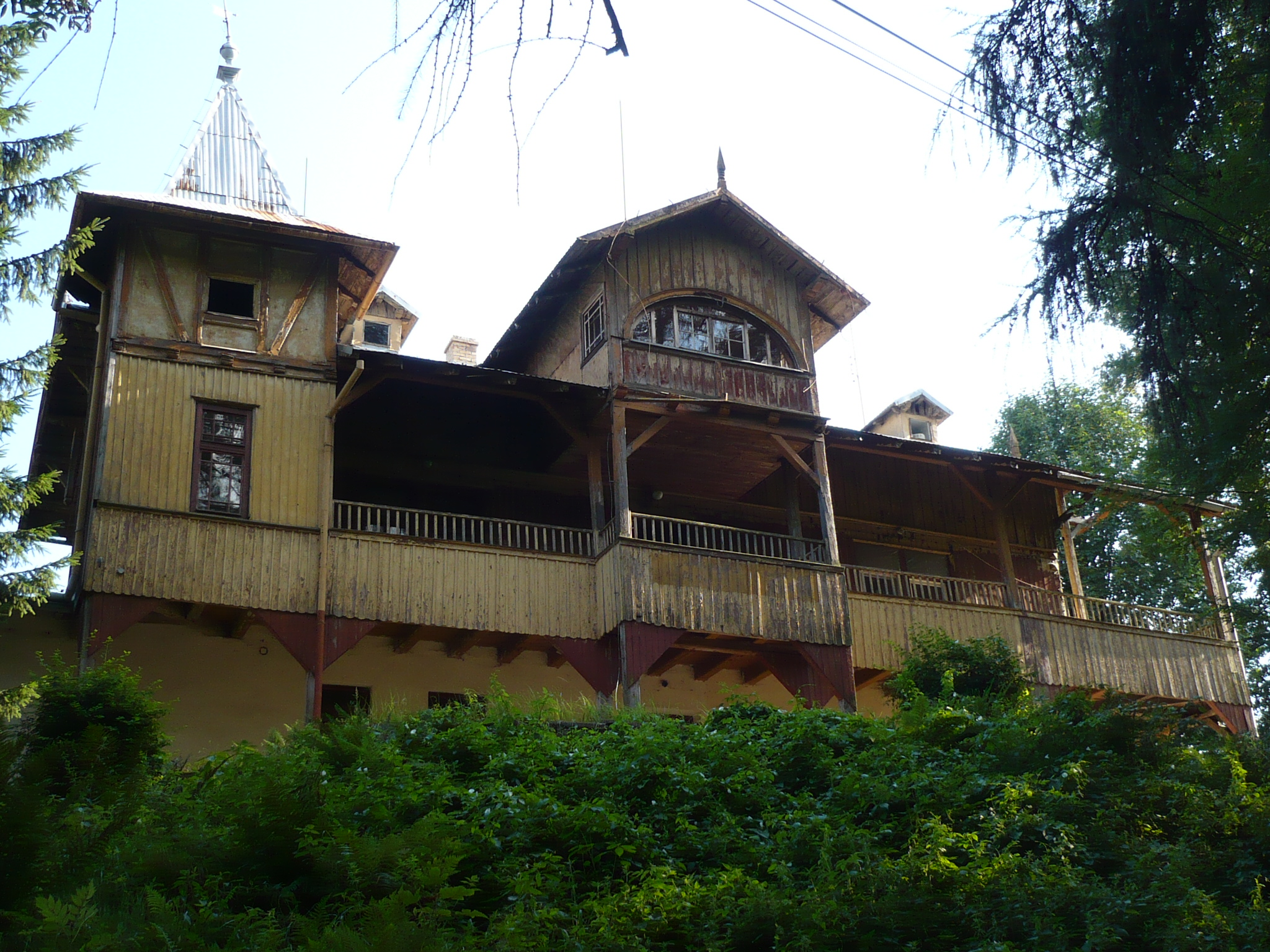 Nowa Ruda, schronisko na Górze św. Anny